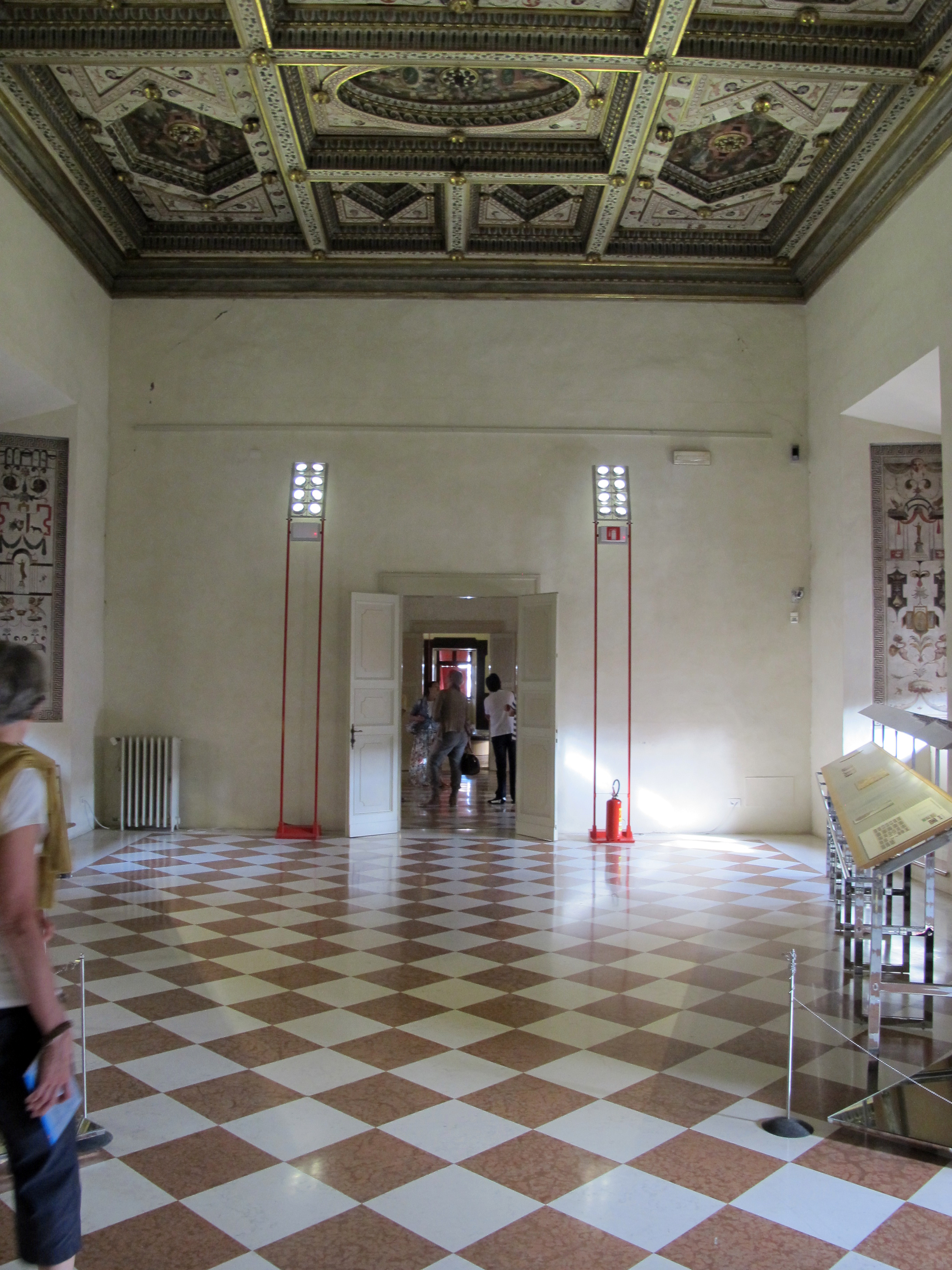 Castello Estense - MIBAC This is a photo of a monument which is part of cultural heritage of Italy.